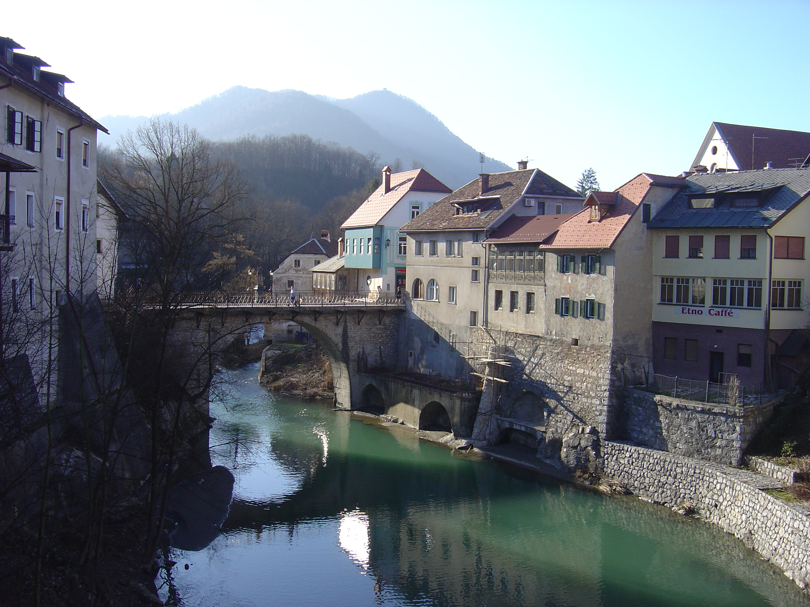 Škofja Loka, Slovenia